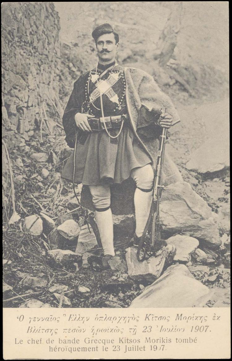 Андартският капитан от Влашка Блаца Христос Аргиракос с псевдоним Кицос Морикис